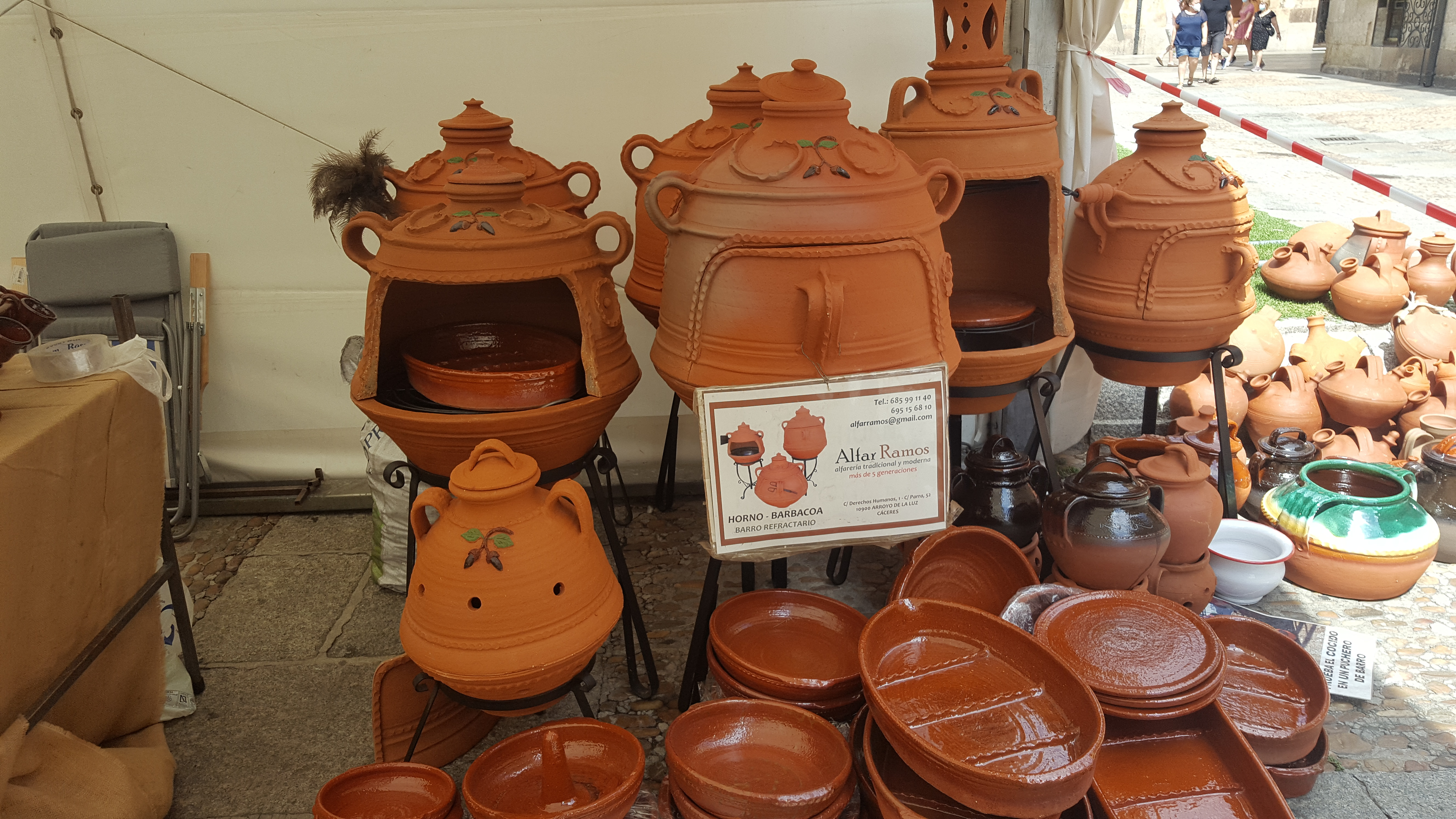 Horno refractario y fuentes para asados. Arroyo de Luz. Cáceres.En la Feria de cerámica de Salamanca España